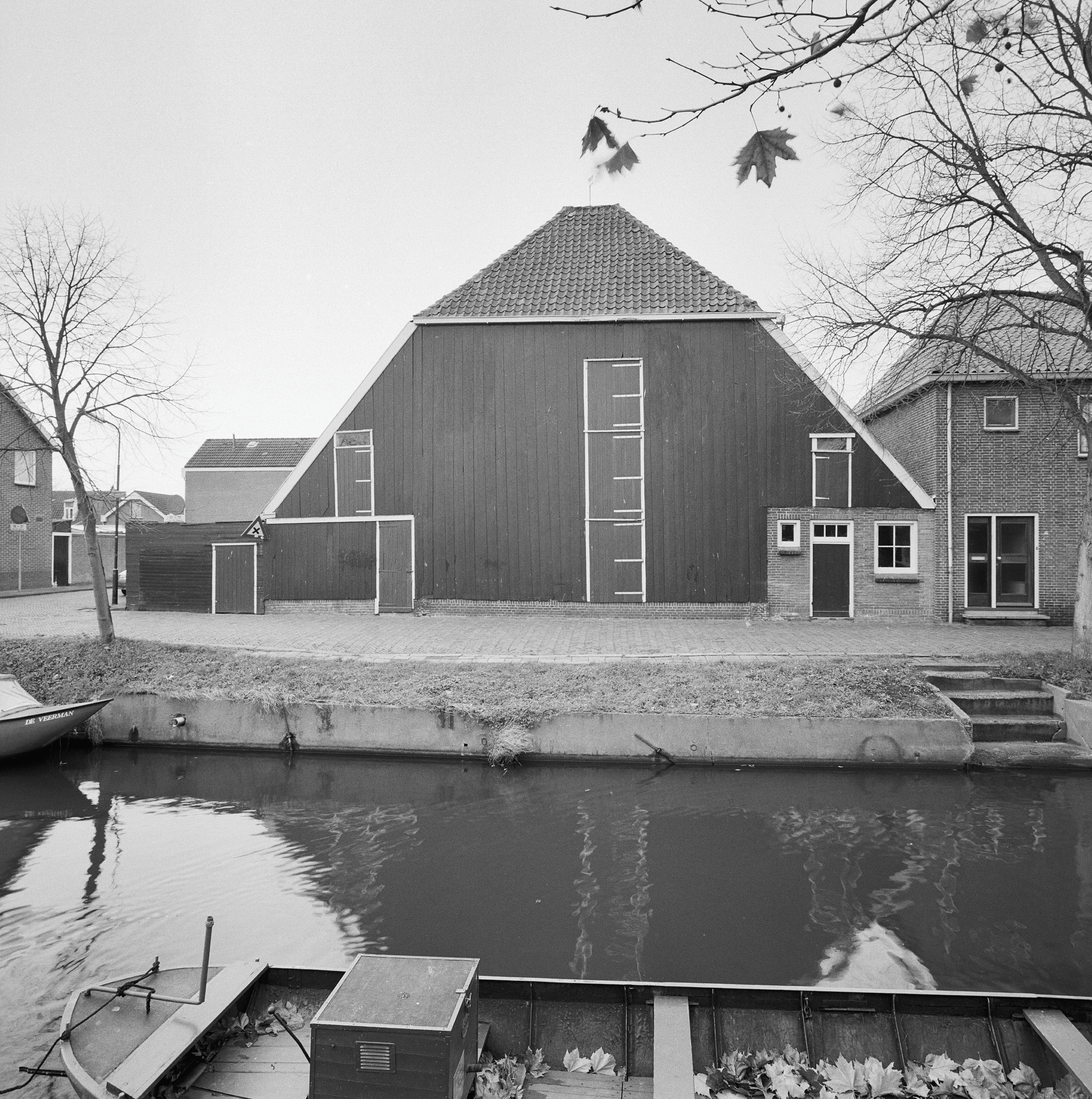 Boerderijen: Overzicht voorgevel met gracht